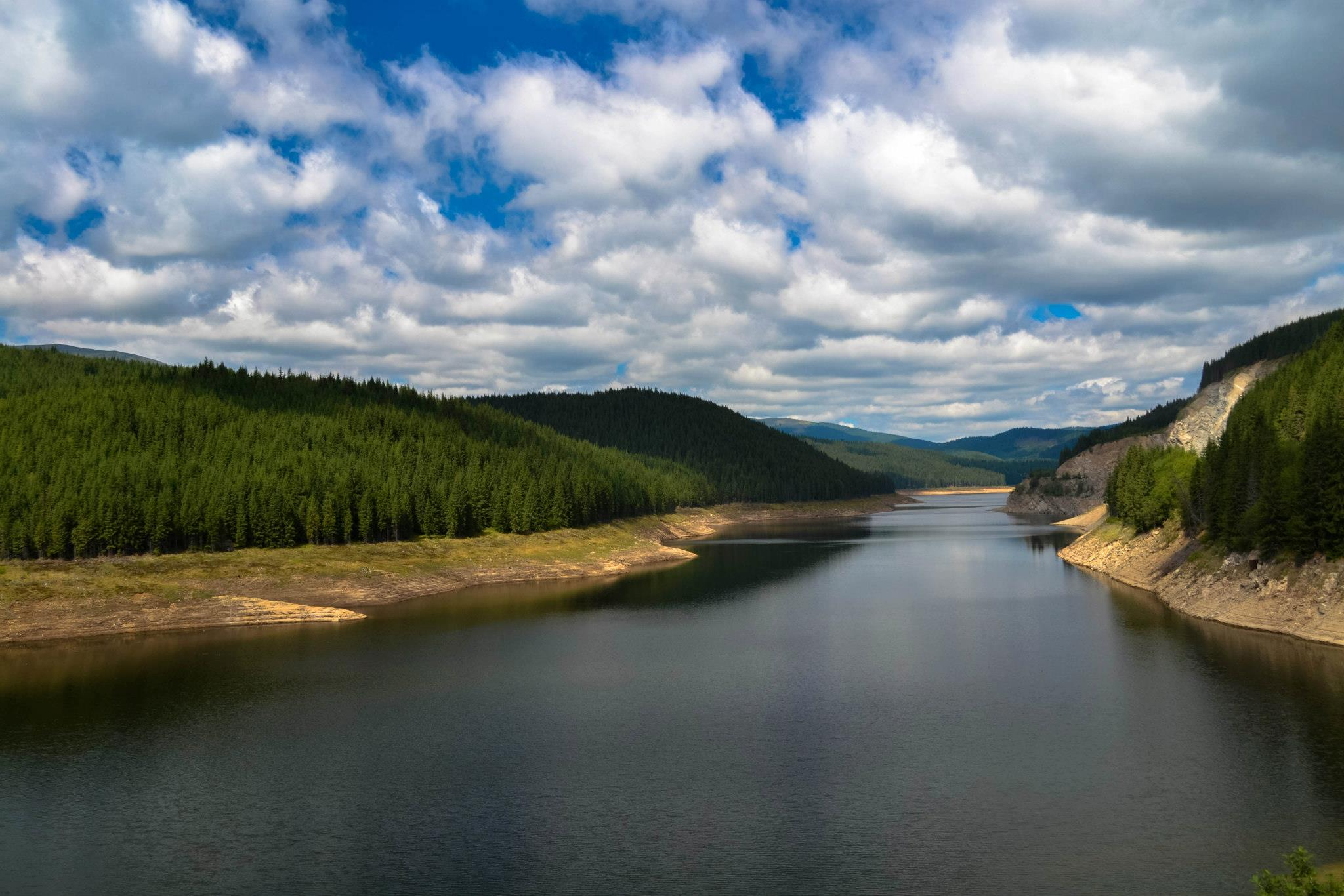 lac de acumulare